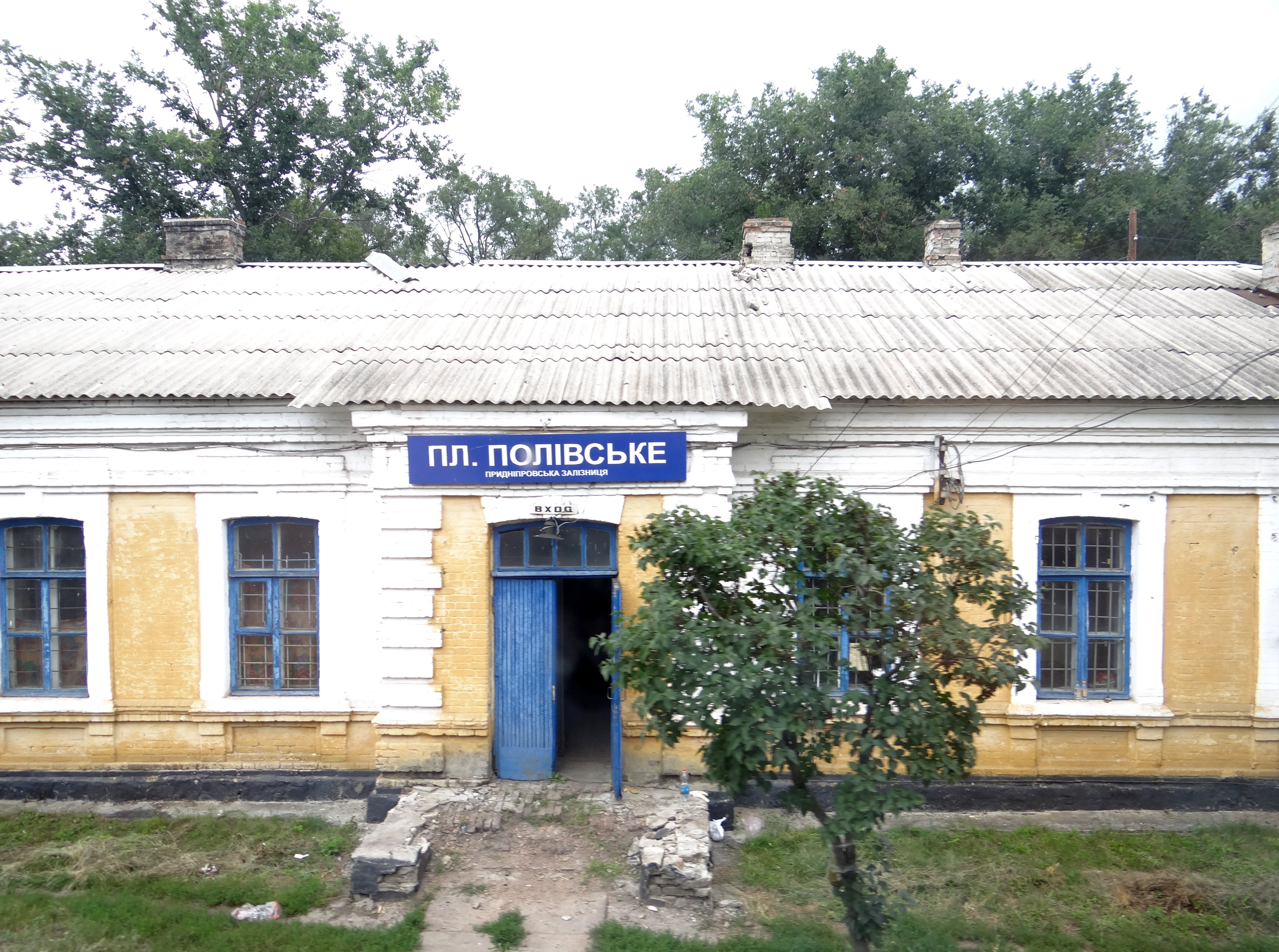 Полівське